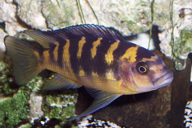 Pseudotropheus crabro Mâle (dominant)